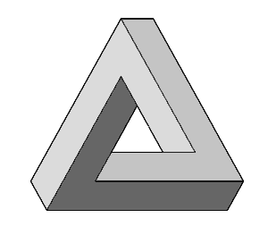 Penrose-Dreieck